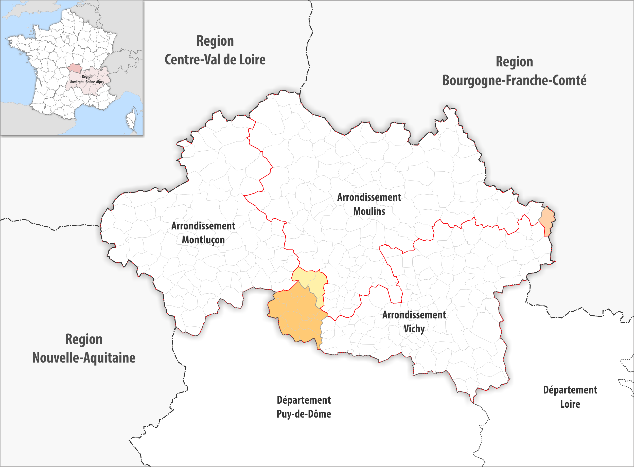 Arrondissements Anpassungen auf 2017 im Departement Allier